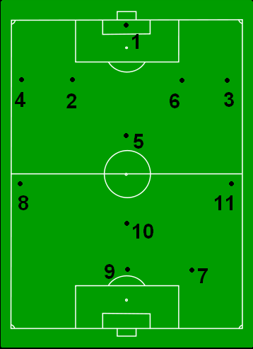 Diagrama de la táctica más común del fútbol, el 4-3-1-2, con su respectiva numeración.